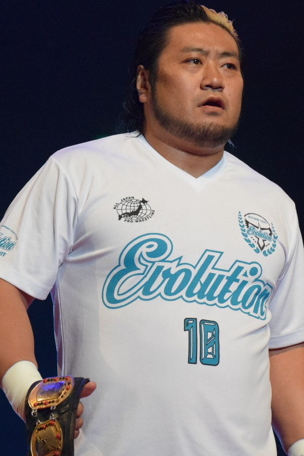 2018年7月29日 大阪府立体育会館 「2018 SUMMER ACTION SERIES」 諏訪魔